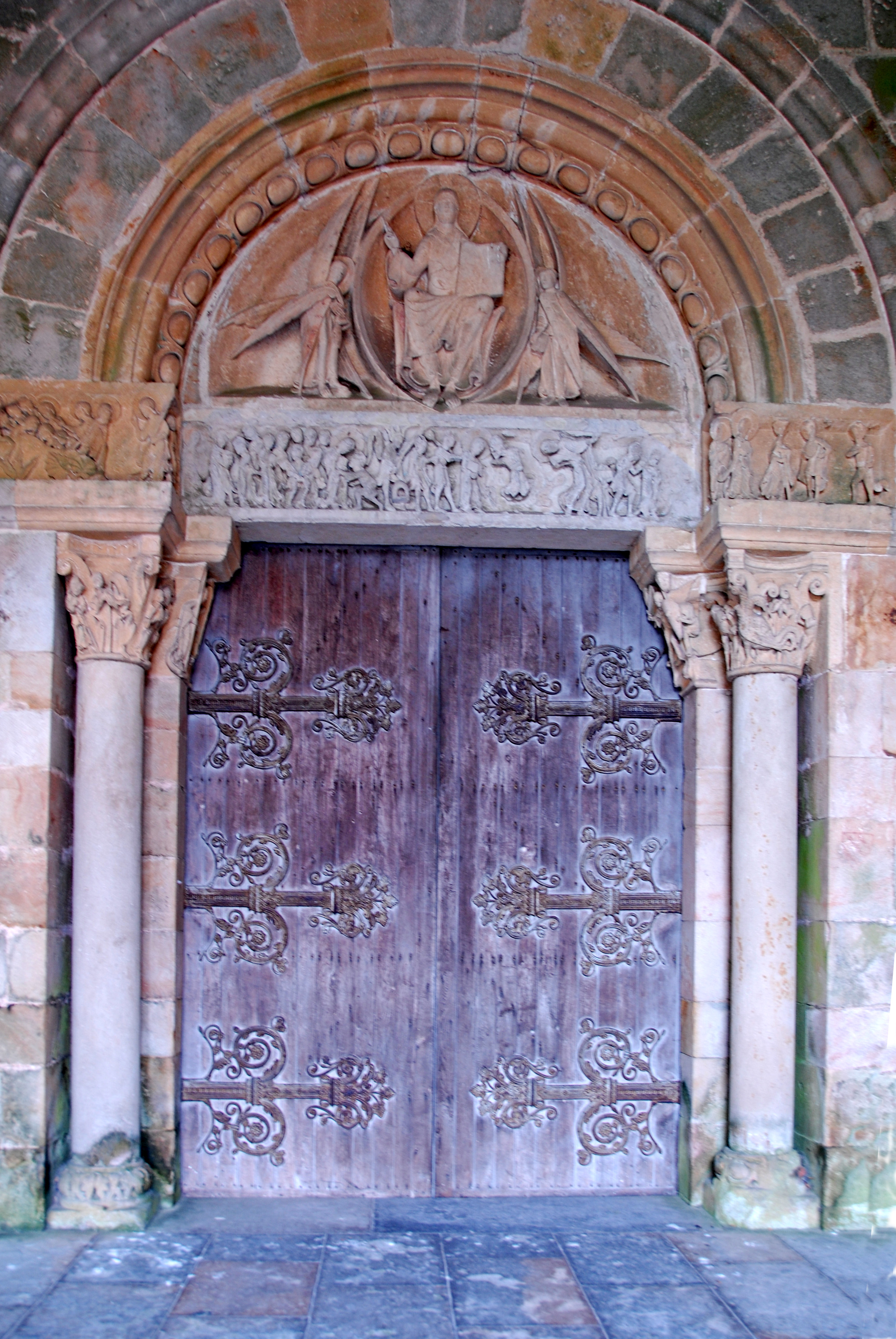 Portal